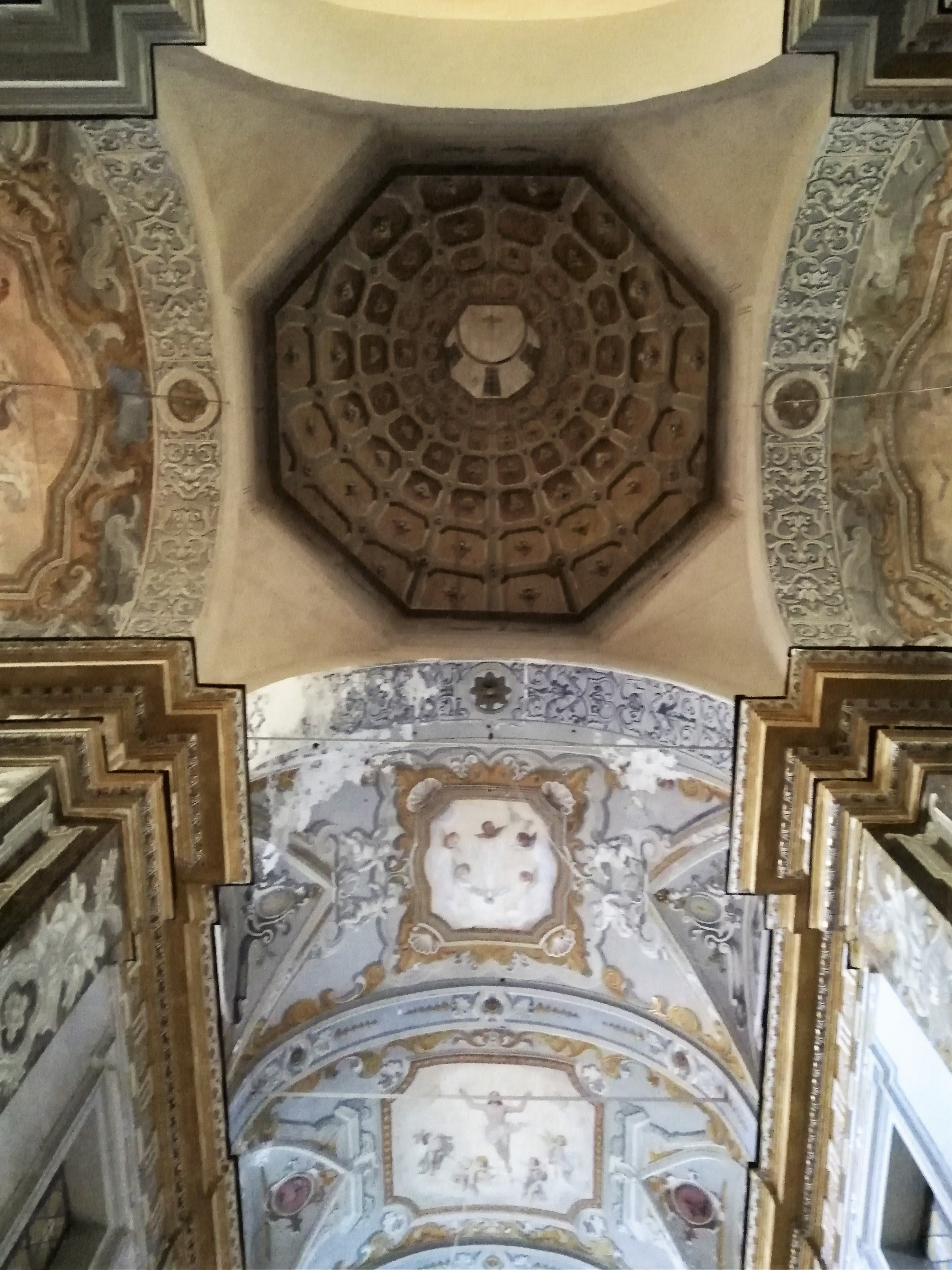 Crociera, cupola fittizia, transetto e volta navata